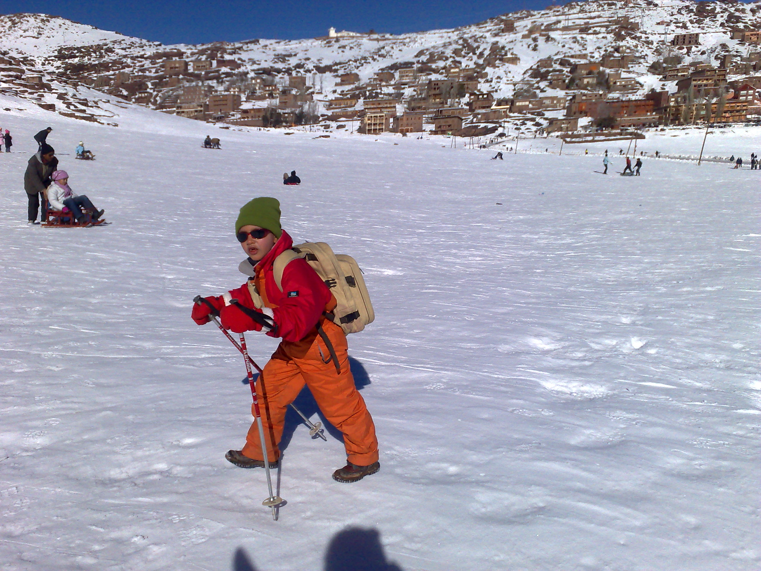 station de Ski d'OUKAIMEDEN Maroc